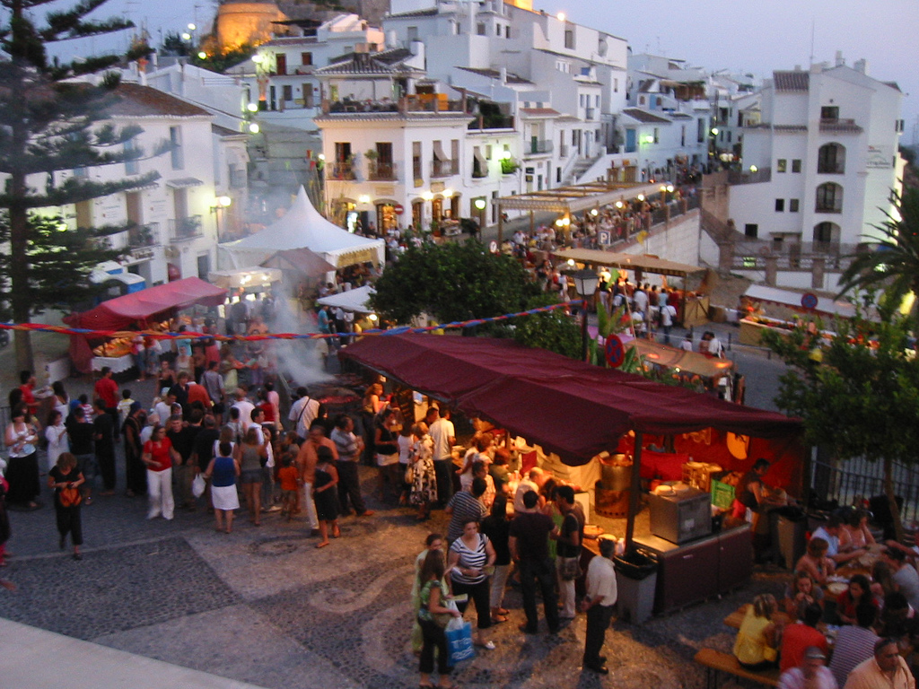 Festival de las tres culturas, Frigiliana, Málaga, Spain.